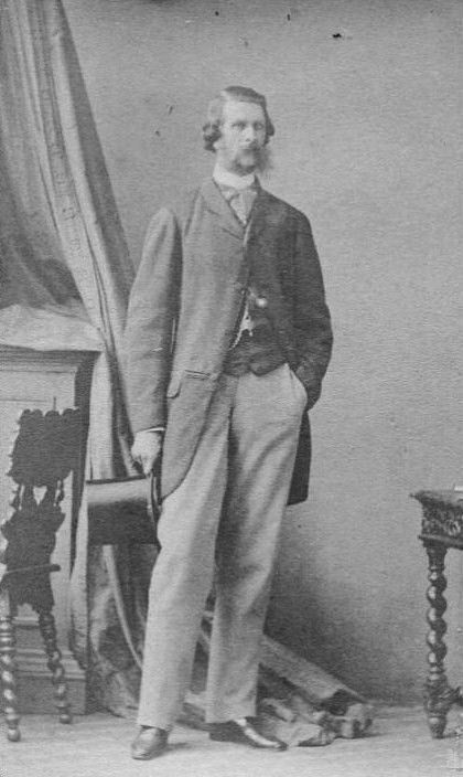 Граф Александр Сергеевич Строганов (1818 – 1864)